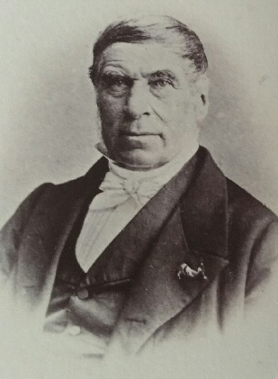 Le doyen de Boisgiraud par Marrast "photographie toulousaine" vers 1860. Avec la permission des héritiers Delaunay et la Bibliothèque Nationale de France, site Arsenal.